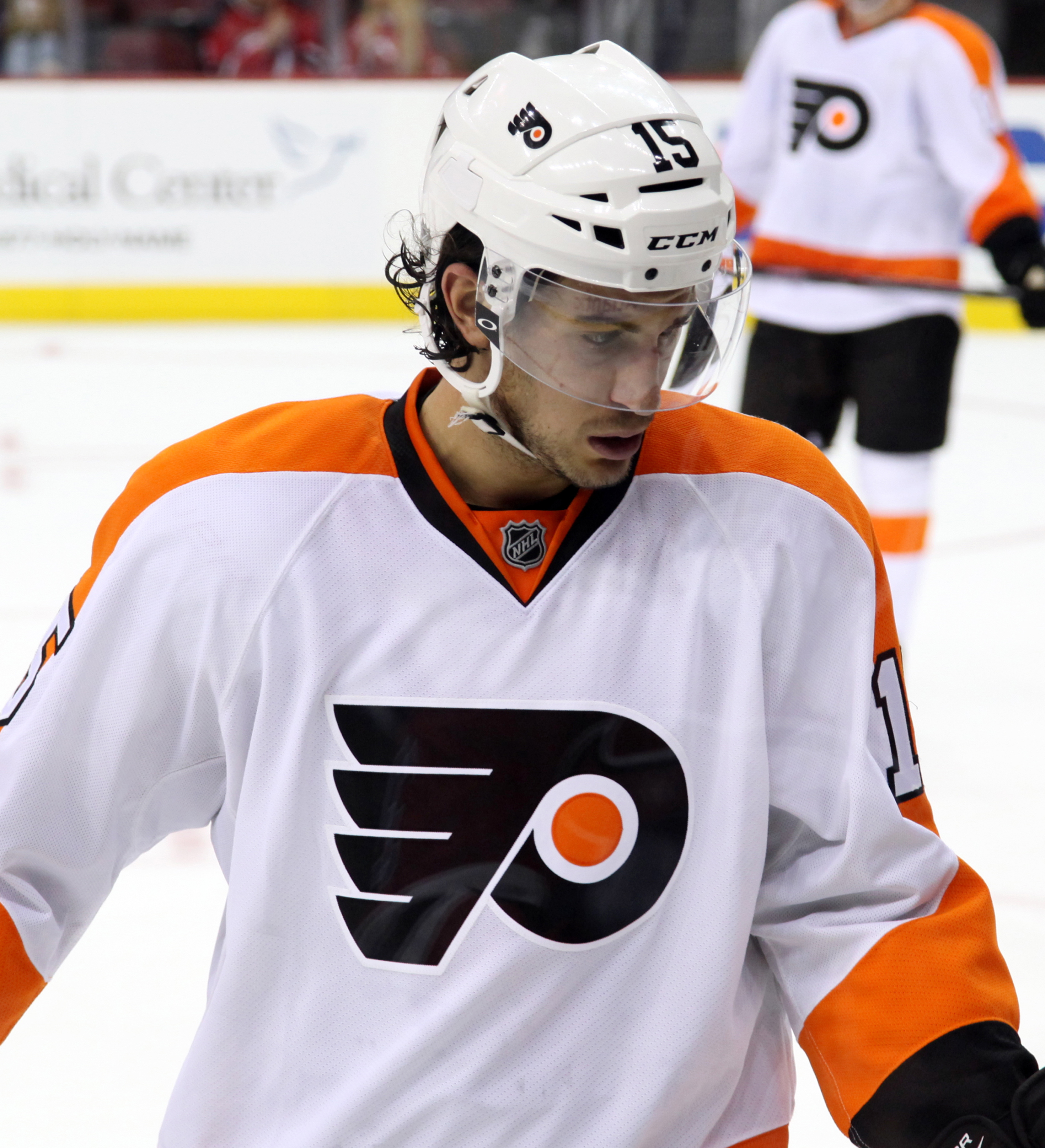 IMG_3988 Del Zotto in September 2014.